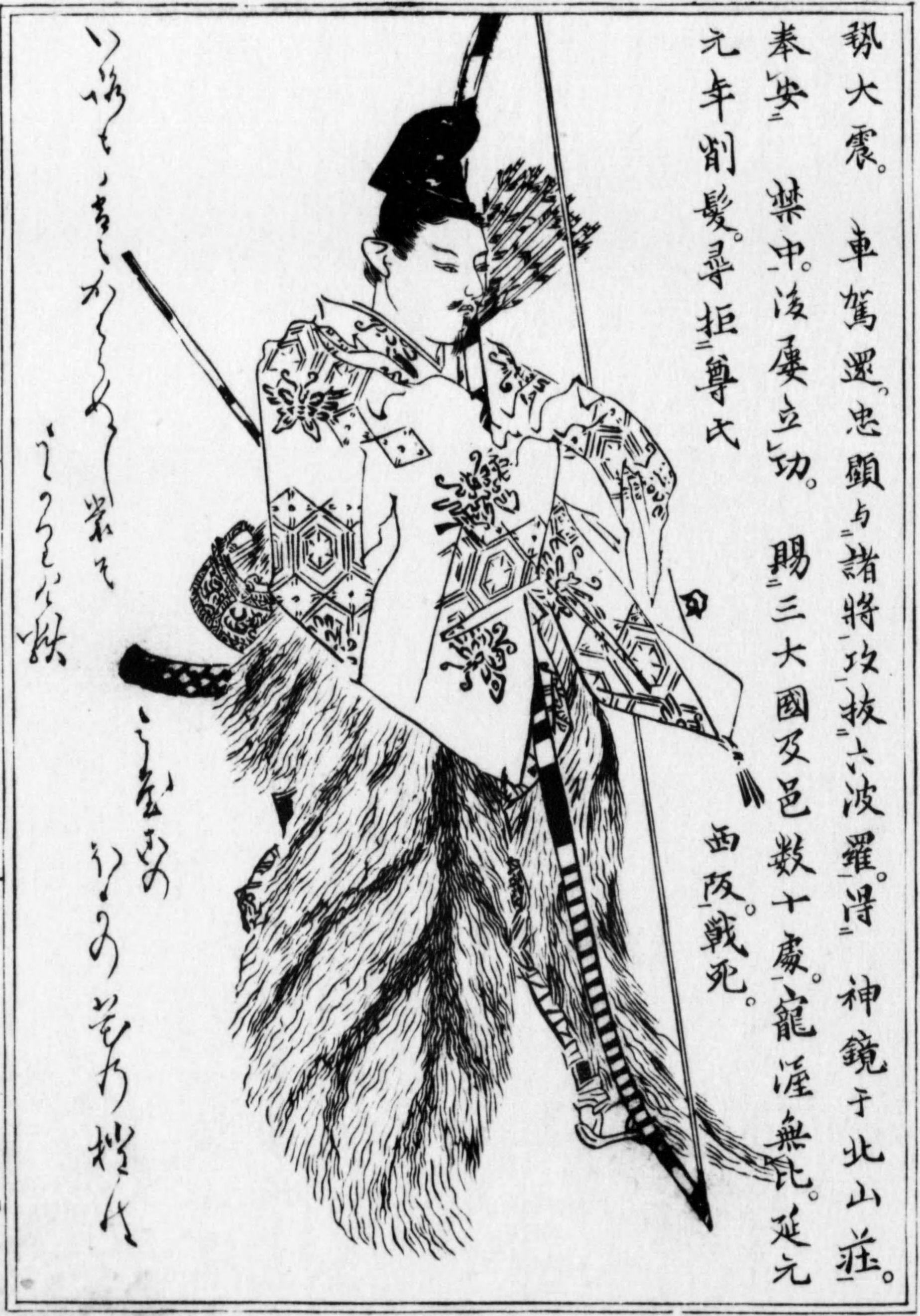 『前賢故実』より